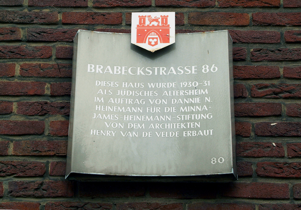 An dem rechten Torhaus zum Heinemanhof in der Brabeckstraße 86 erläutert die Stadttafel Hannover (Nummer 80) unter er gleichnamigen Überschrift: "... Dieses Haus wurde 1930-31 als jüdisches Altersheim im Auftrag von Dannie N. Heinemann für die Minna-James-Heinemann-Stiftung von dem Architekten Henry van de Velde erbaut" ...